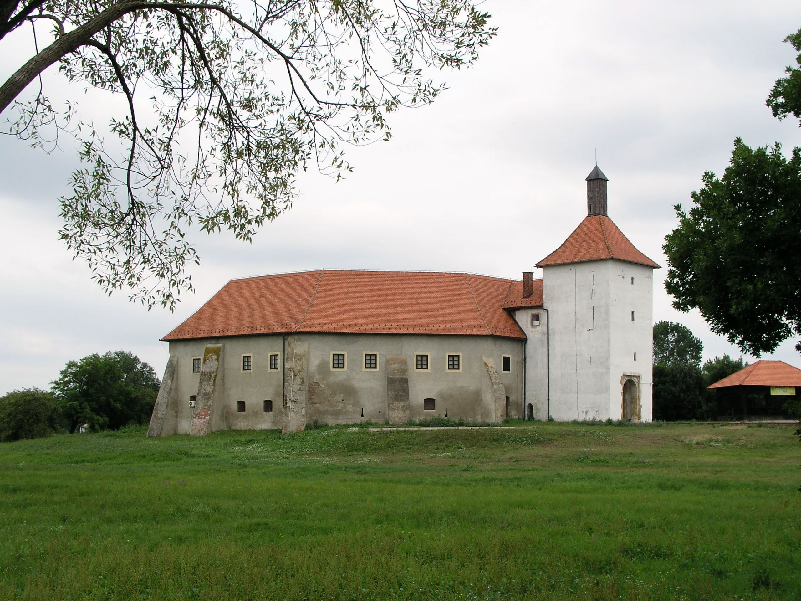 Đurđevački stari grad